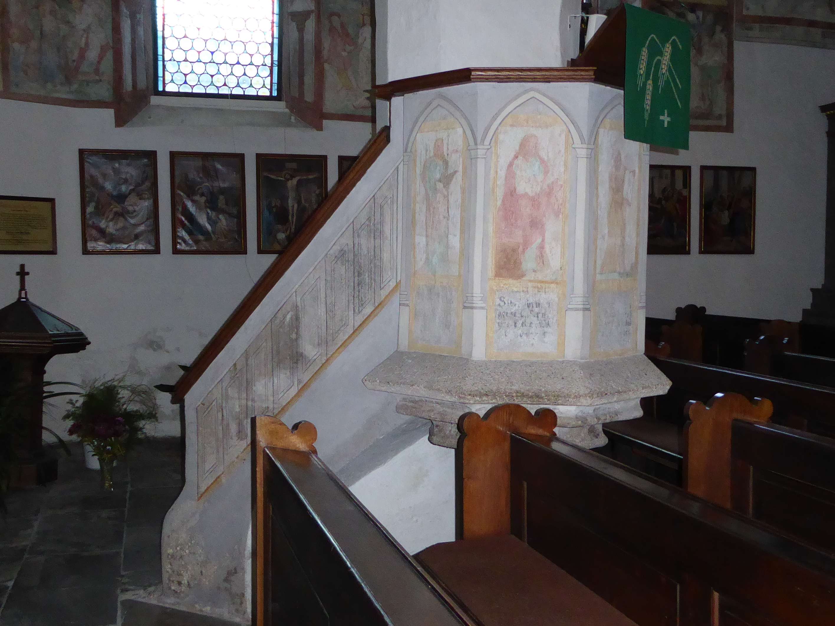 Bürgerspitalkirche hl. Katharina, Eberhard-Platz, Waidhofen an der Ybbs, Niederösterreich - Steinkanzel mit gedrehtem Schaft und Malereien (Evangelisten)